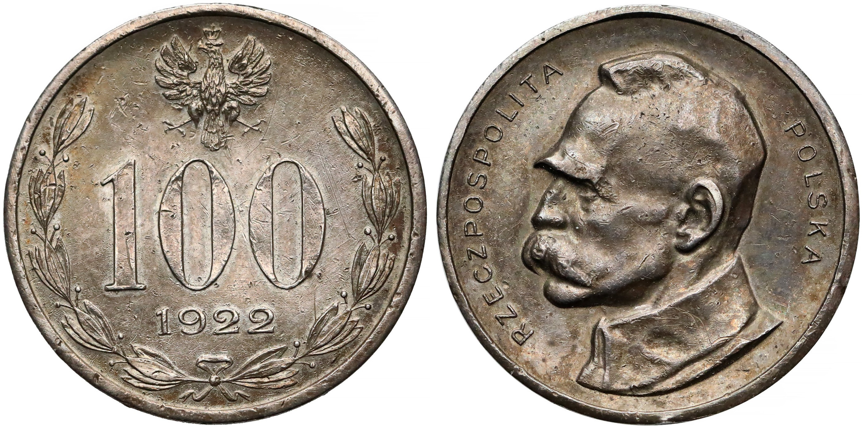 PRÓBA 100 marek polskich 1922 srebro